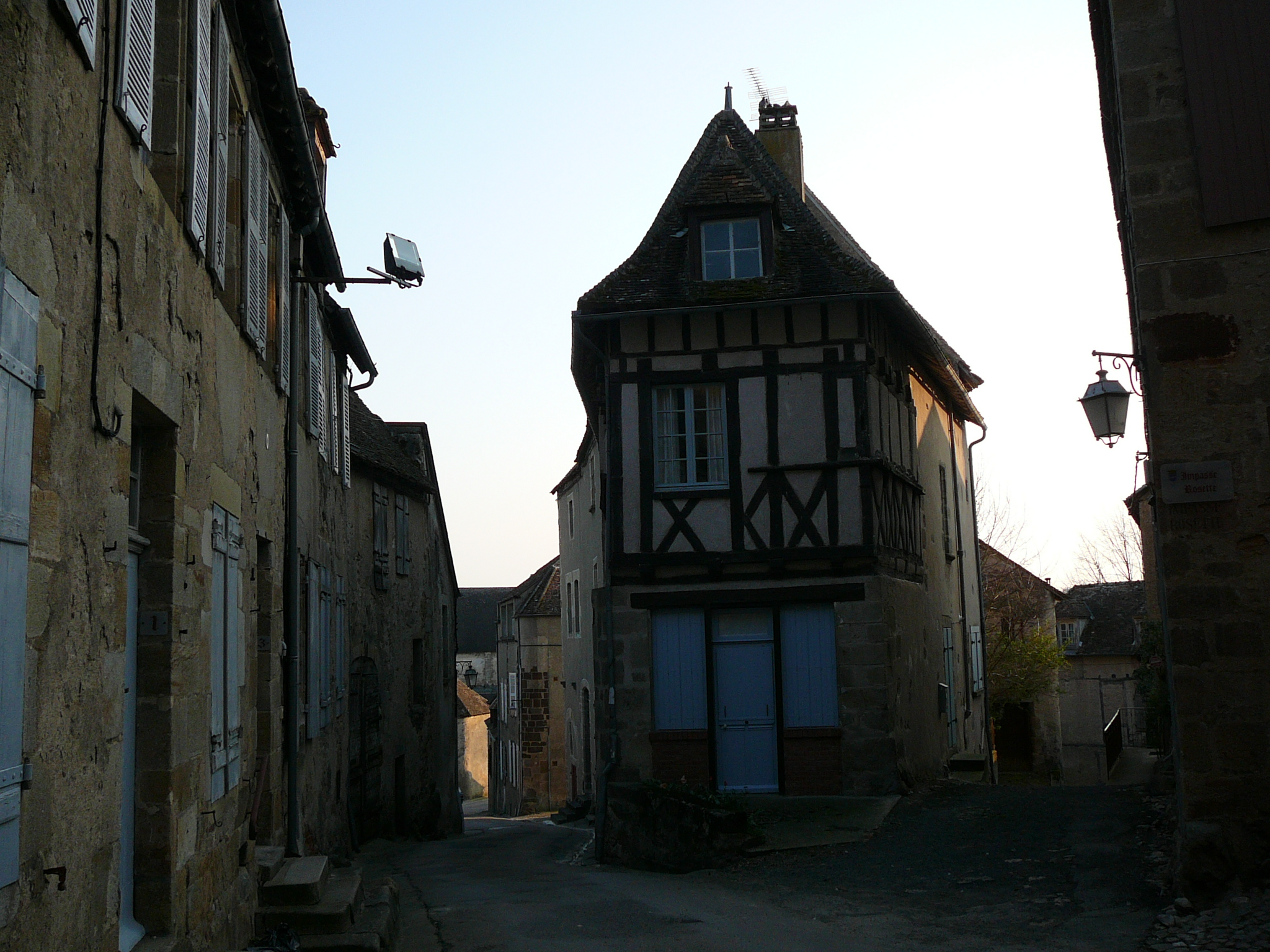 saintbenoitdusault3.jpg